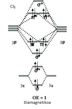 Cl2 -ren OM eskema